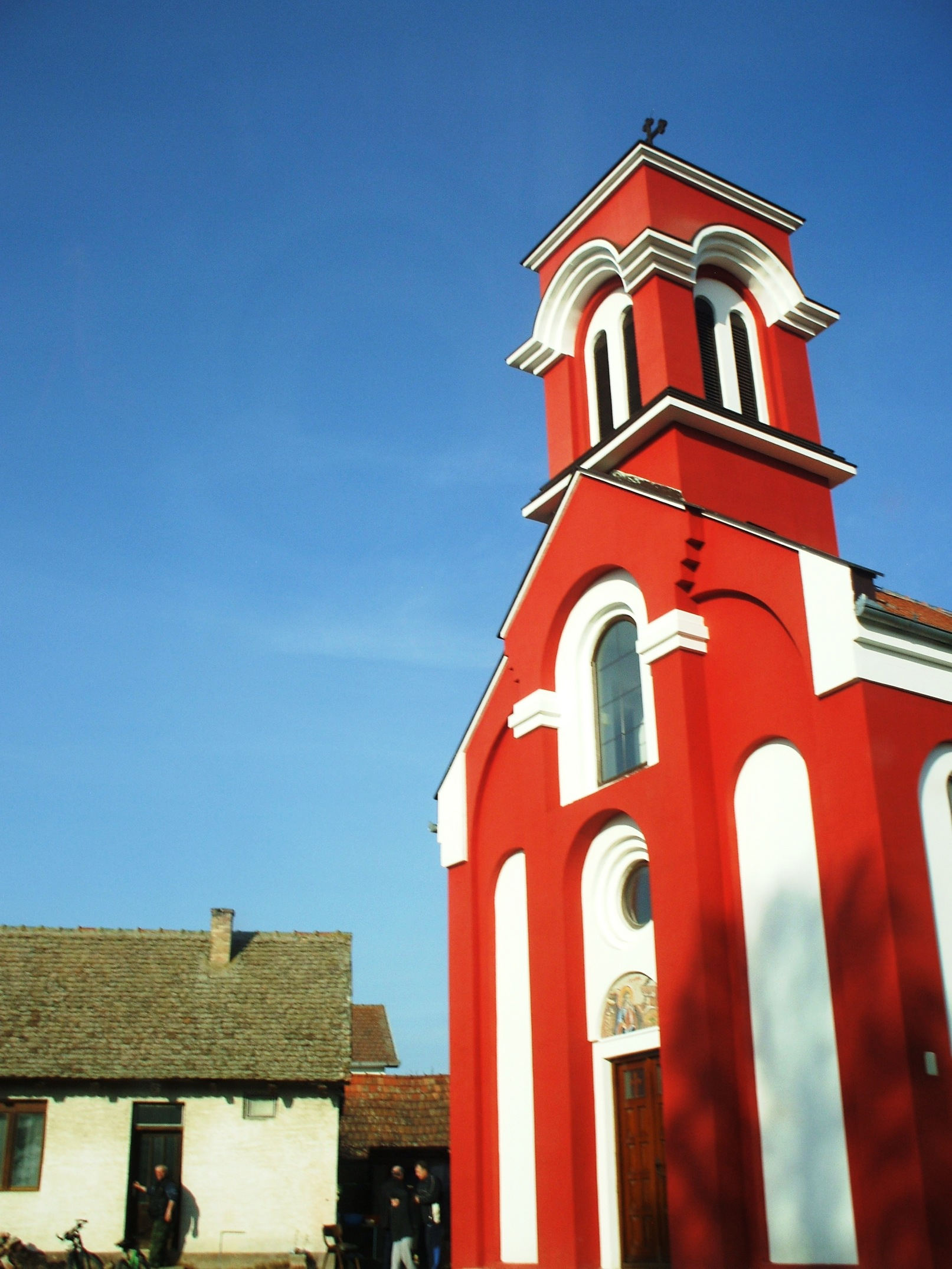 Гибарац (православна црква)